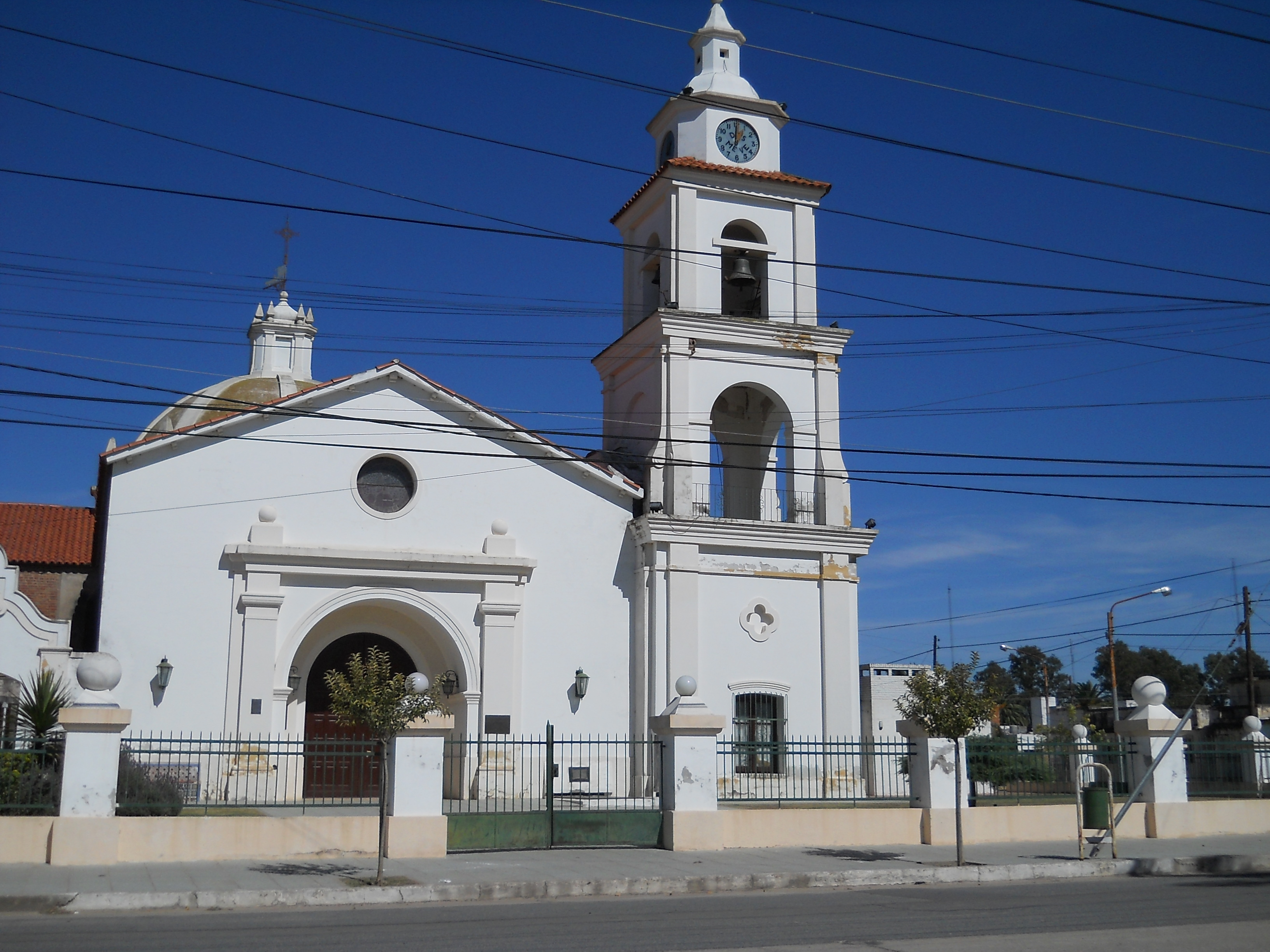 Viste Frontal de la Iglesia de Ballesteros